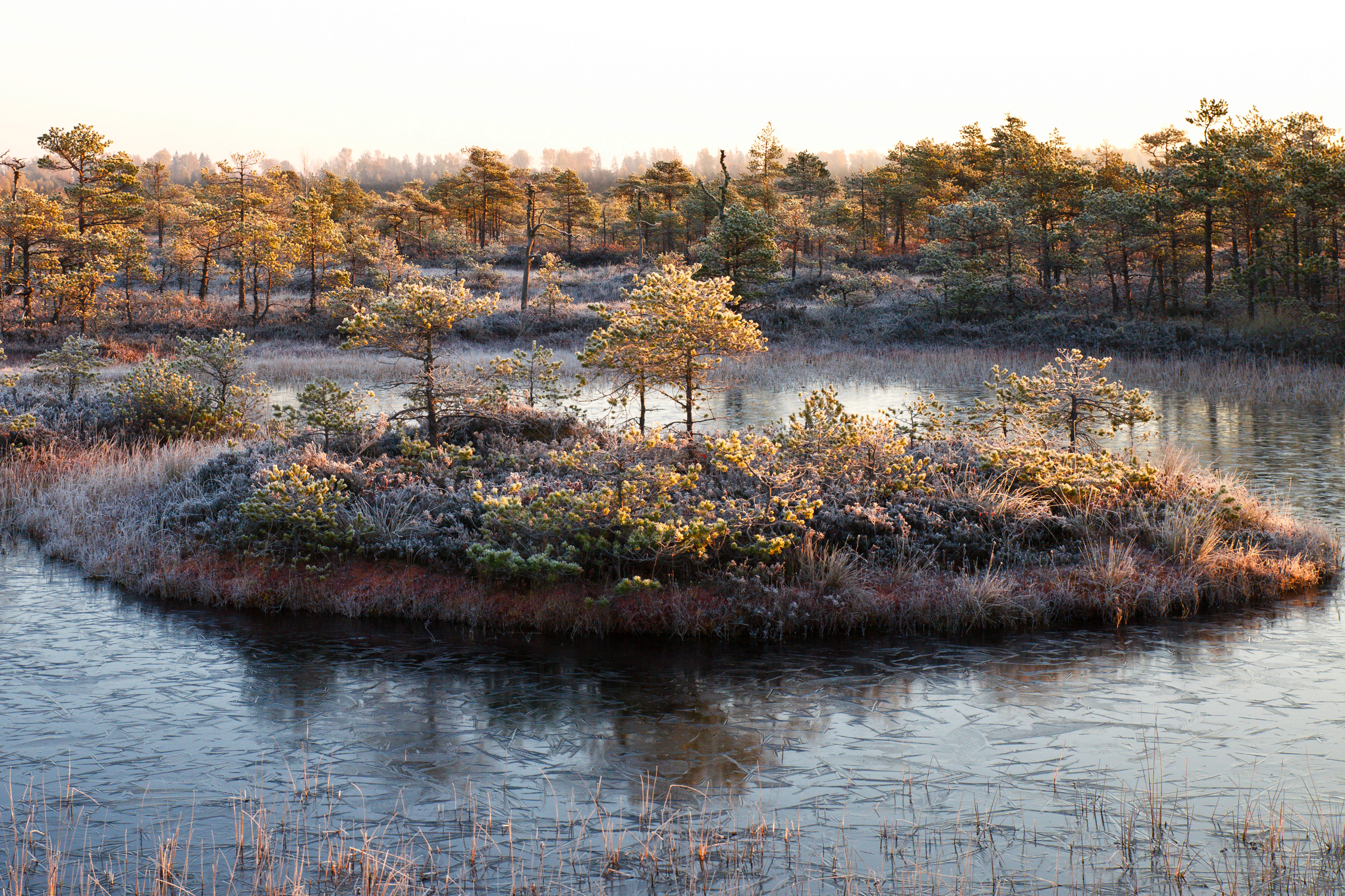 Endla looduskaitseala